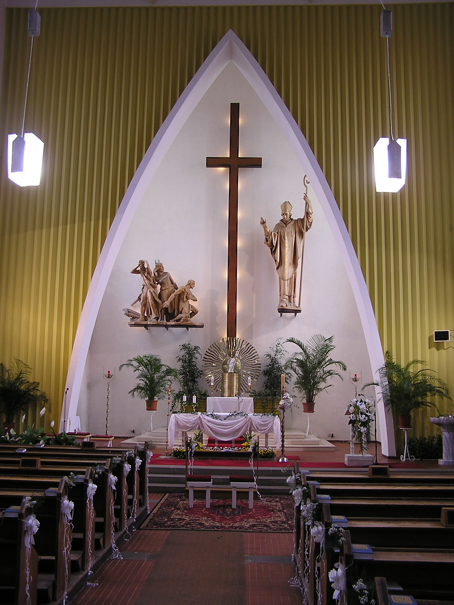 Interiér kostela sv. Vojtěcha